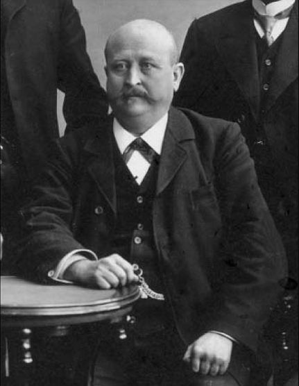 Franz Winter (1860–1920), homme politique allemand (SPD)